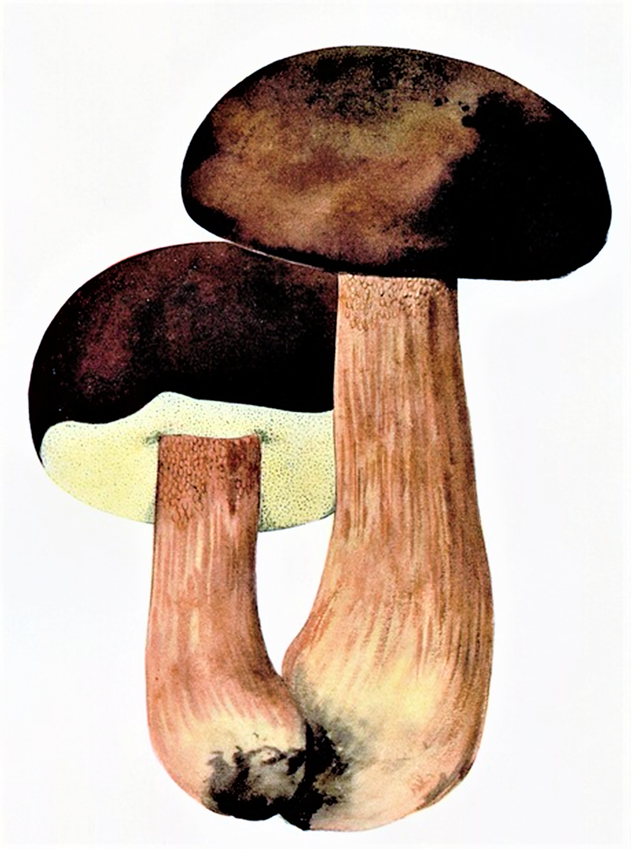 Giacomo Bresadola: Boletus aereus Bull. (1789), 2. und richtige Darstellung